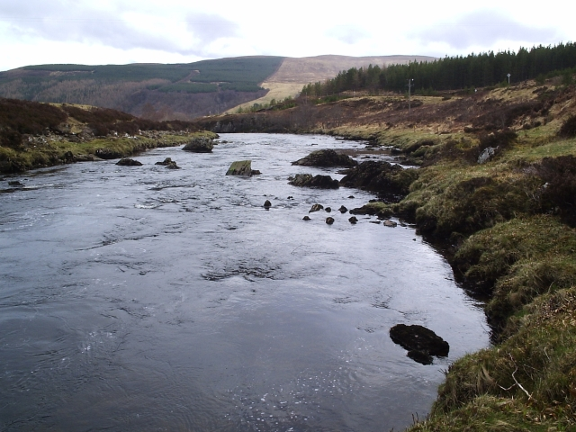 River Oykel, near Oykel Bridge, looking downstream